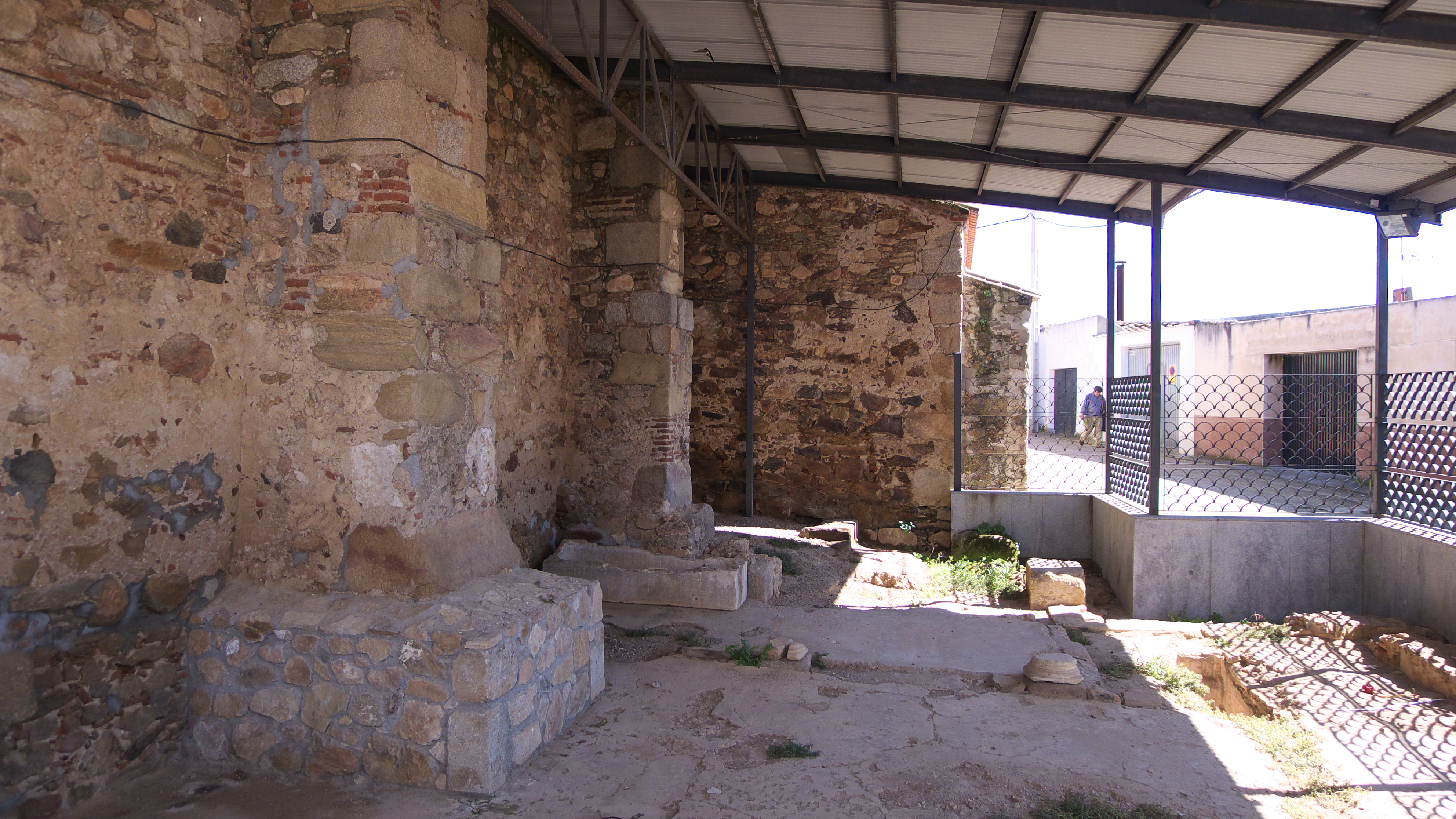 Muy cerca de Mérida, existió esta iglesia, integrante de un monasterio visigodo, cuyo abad fué Nucto.